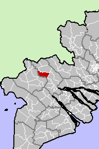 Thanh Binh District, Dong Thap Province, Vietnam.